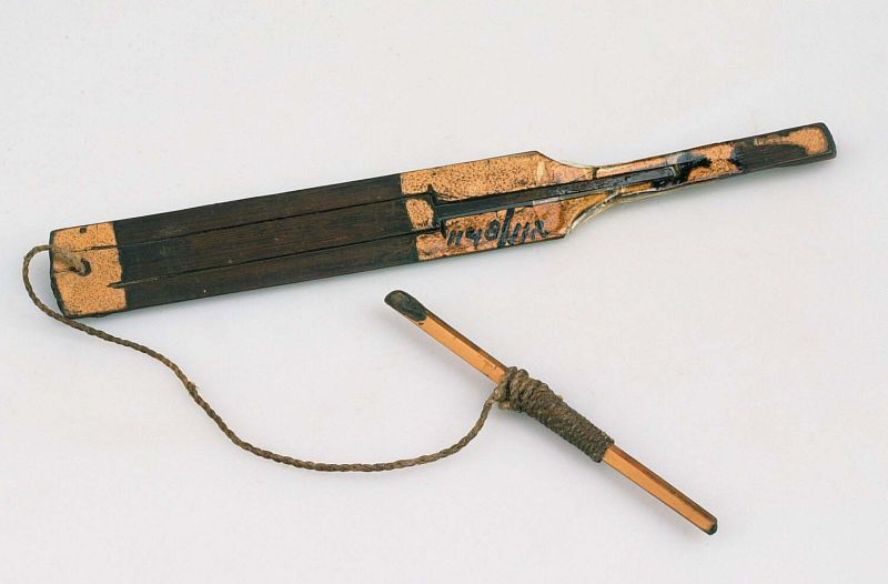 Tokkelinstrument. Mondharp van bamboe Unknown language: Weto